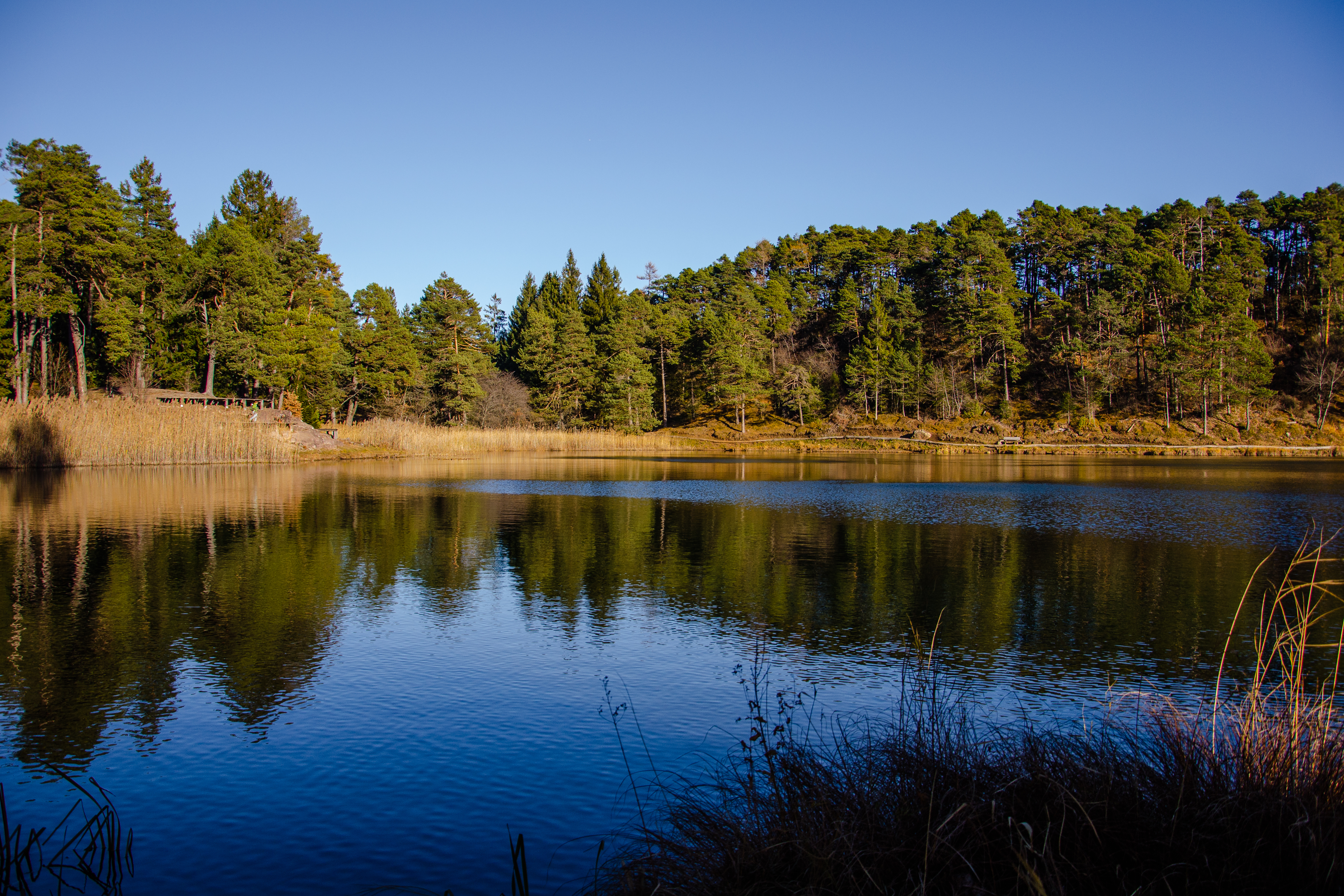 Lago di Santa Colomba (Q49967160)